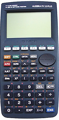 pocket calculator